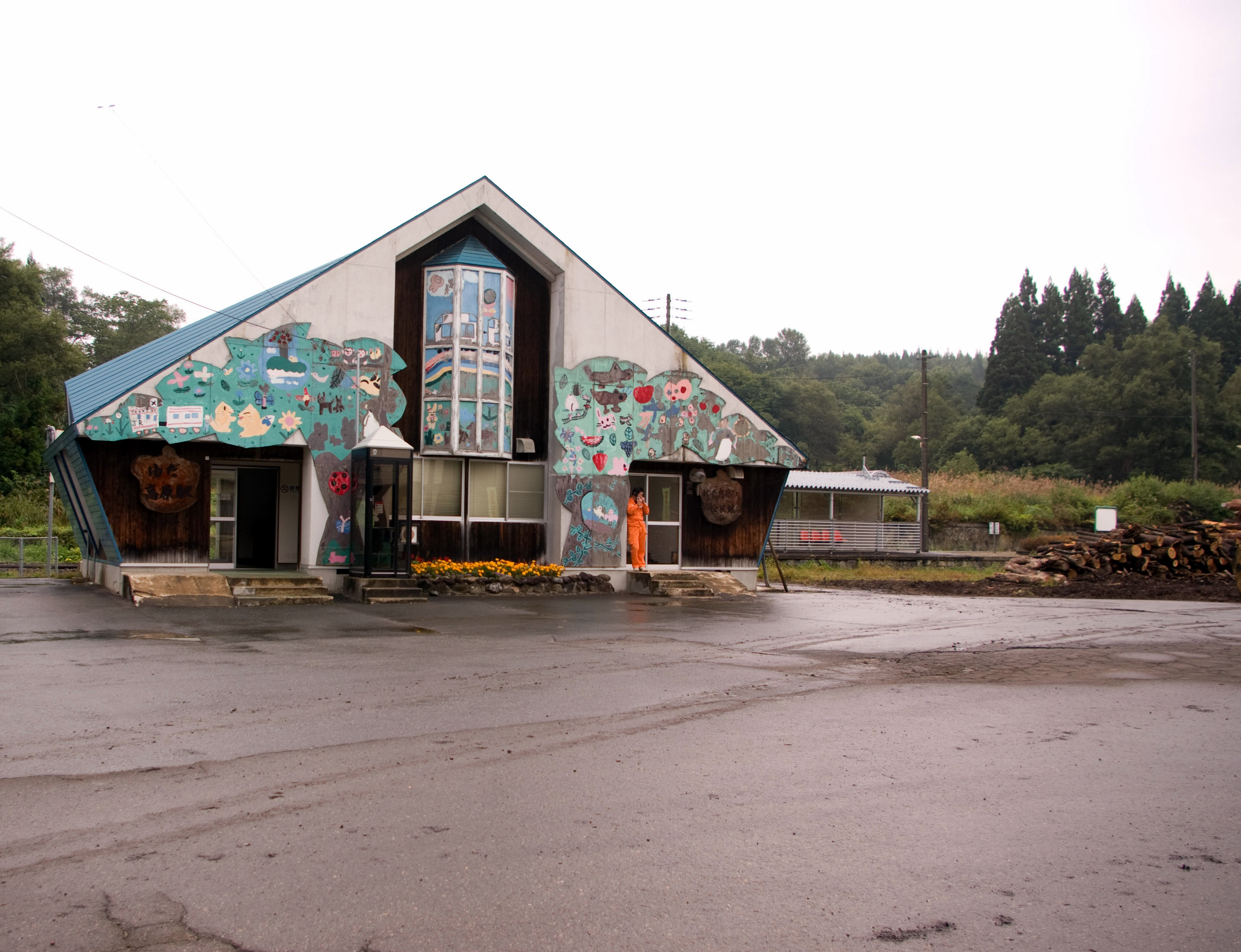 東日本旅客鉄道株式会社北上線ゆだ高原駅